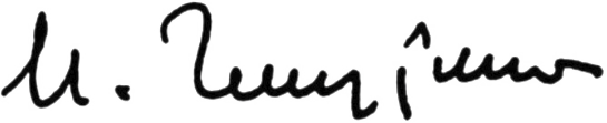 Роспись украинского архитектора Натальи Чмутиной (1912–2005)